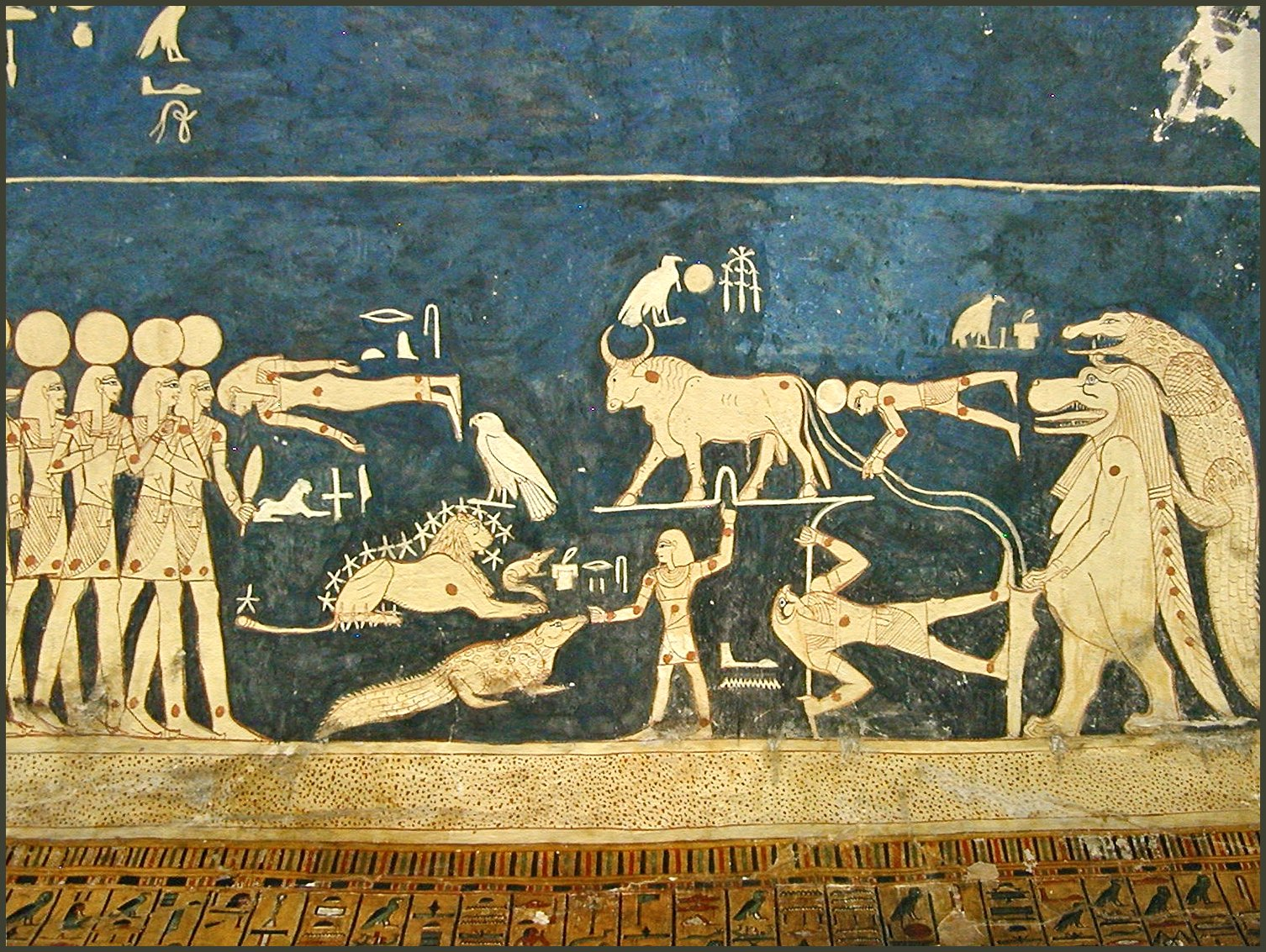 Détail du plafond astronomique de la Chambre funéraire du pharaon Sethi 1er. A droite, les Constellations de l'hippopotame et du crocodile